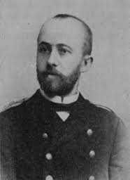 Alois Zábranský (1858 - 1921), Český spisovatel a soudní rada.